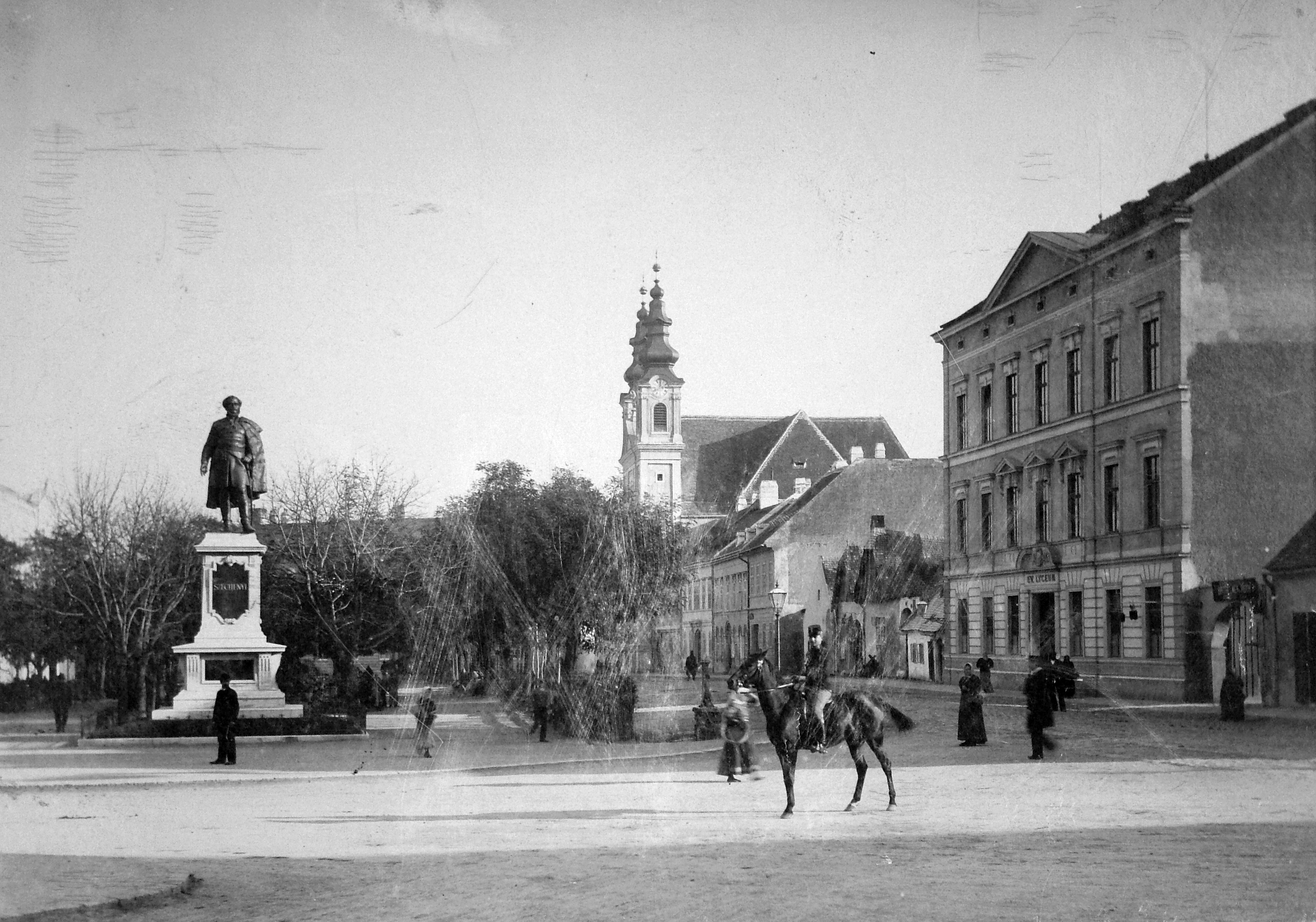 Széchenyi tér a Széchenyi szoborral. Háttérben a Domonkos templom. A felvétel 1897-ben készült. Location: Hungary Tags: sculpture, church, rider, street view Title: Széchenyi tér a Széchenyi szoborral. Háttérben a Domonkos templom. A felvétel 1897-ben készült.